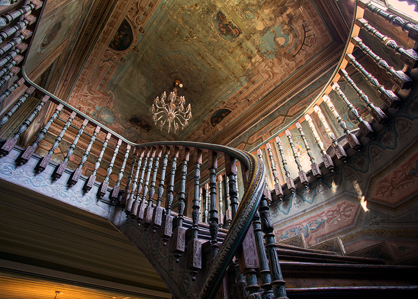 Les palais Feriye sont un ensemble de bâtiments situés sur la rive européenne du Bosphore entre les quartiers de Kabataş et d'Ortaköy